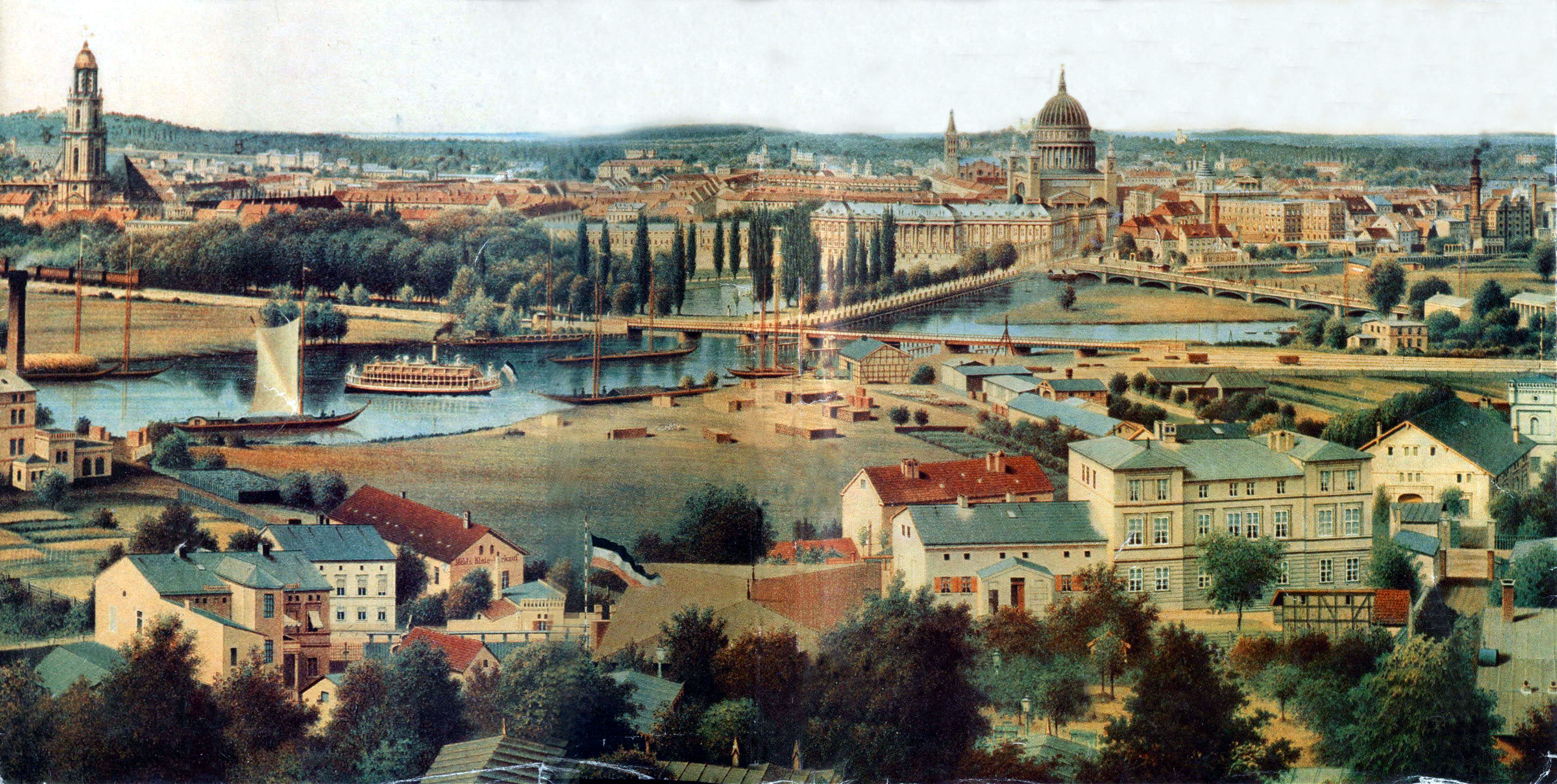 label QS:Lde,"Sechsteilige Klappkarte mit mit Legende der dargestellten Gebäude"